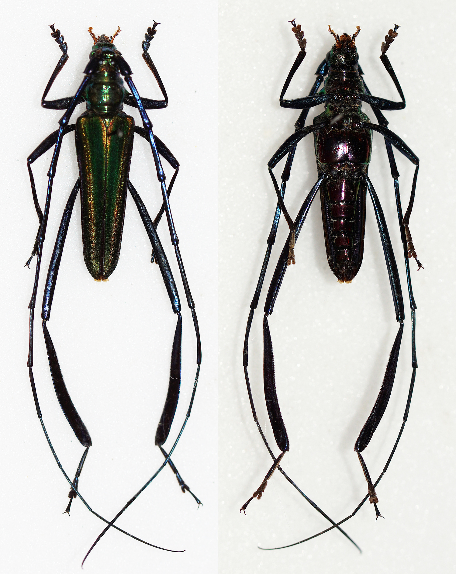 Ritsema,1887 Sex: Male Data: 05-2008 - Lembah anai - West Sumatra Size: 30mm